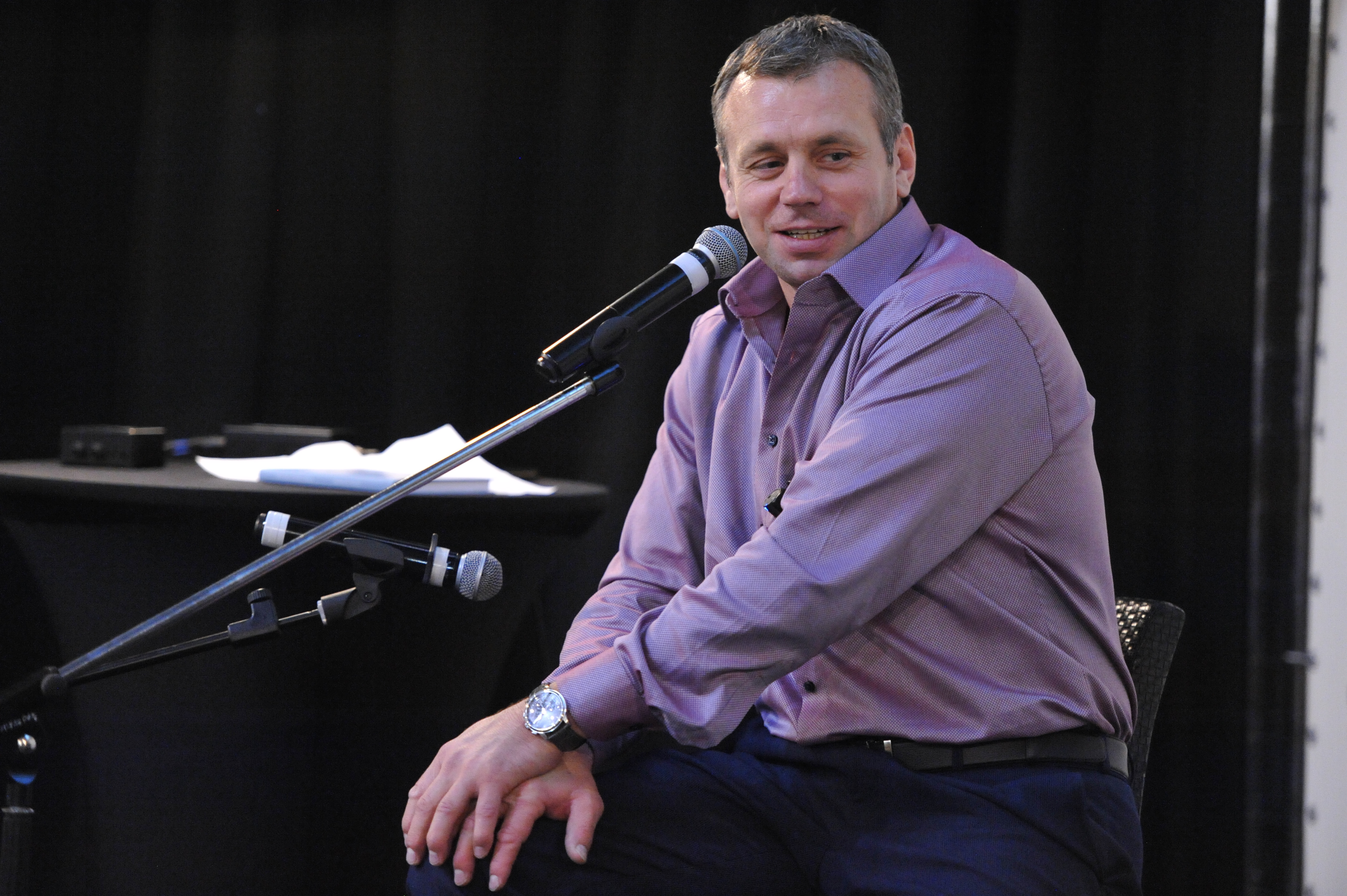 Поэт Игорь Куринной